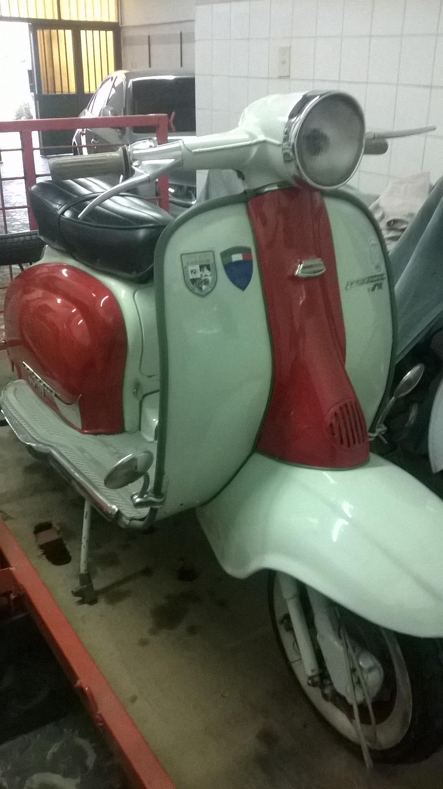 Siambretta 175TV de 1967, fue la última serie fabricada por Siam Di Tella y la más equipada de todas.